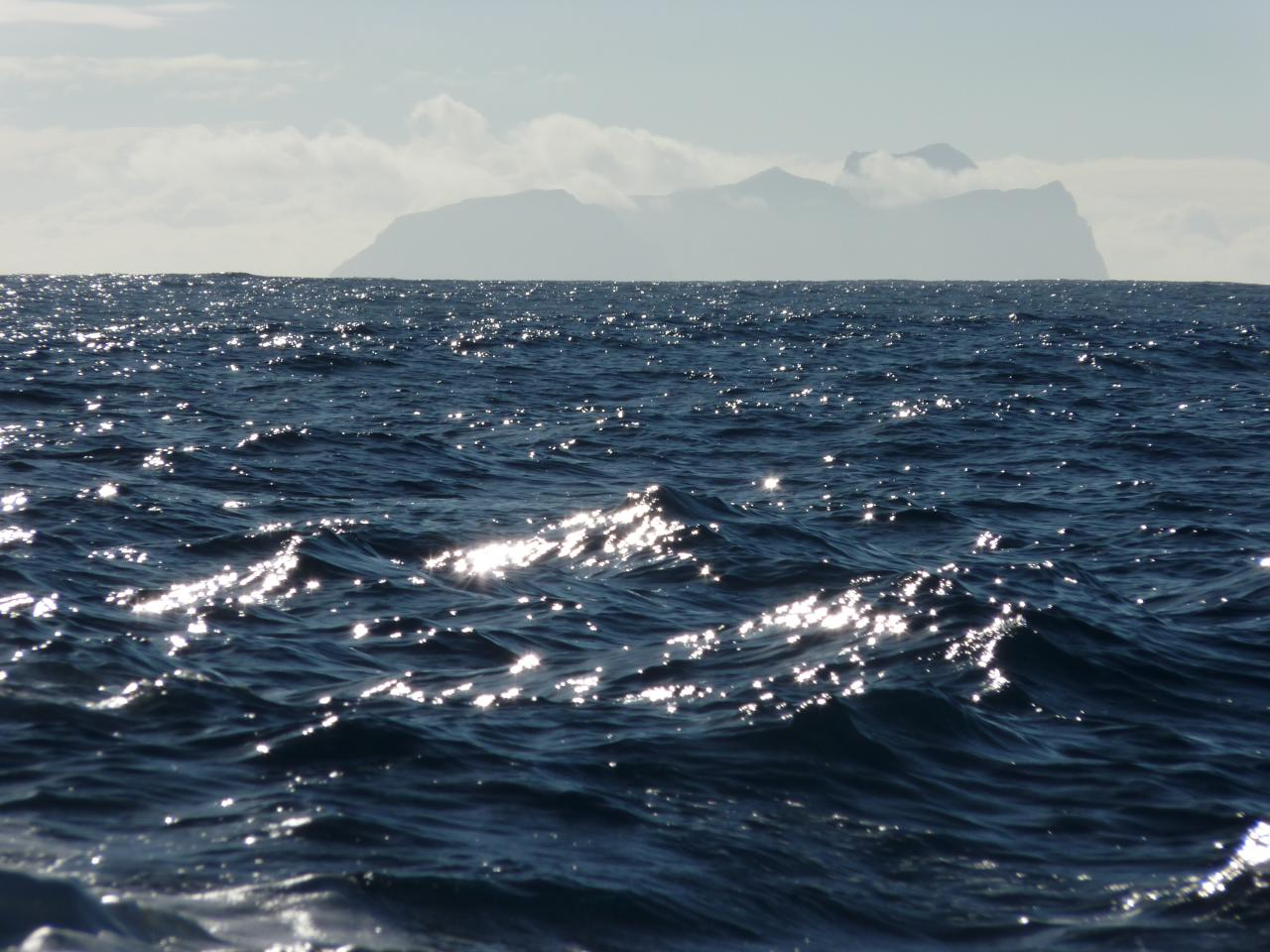 y vamos rumbo a Selkirk. We are goin to Alejandro Selkirk island